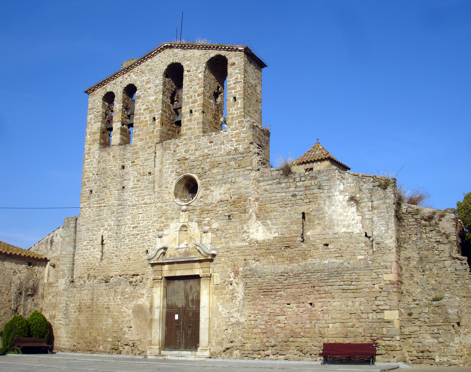 Eglèsia de Sant Pere d'Ullastret (Girona, Catalunya, Espanya)